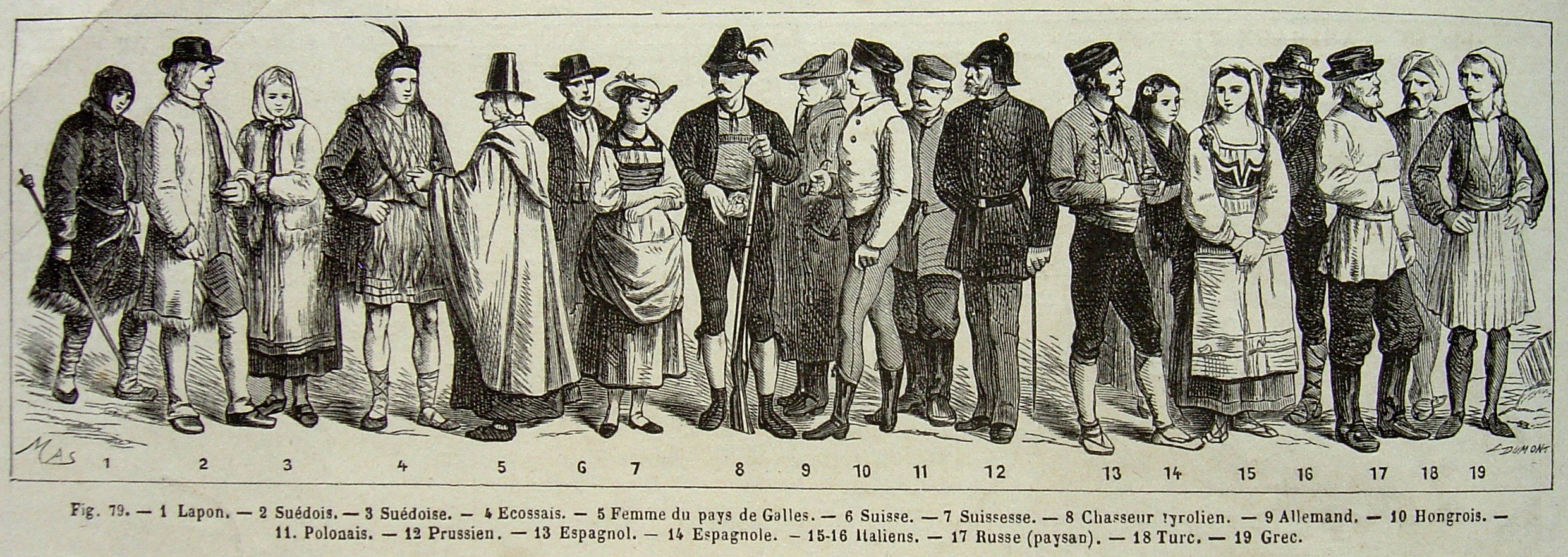 Types hommes européens + turquie